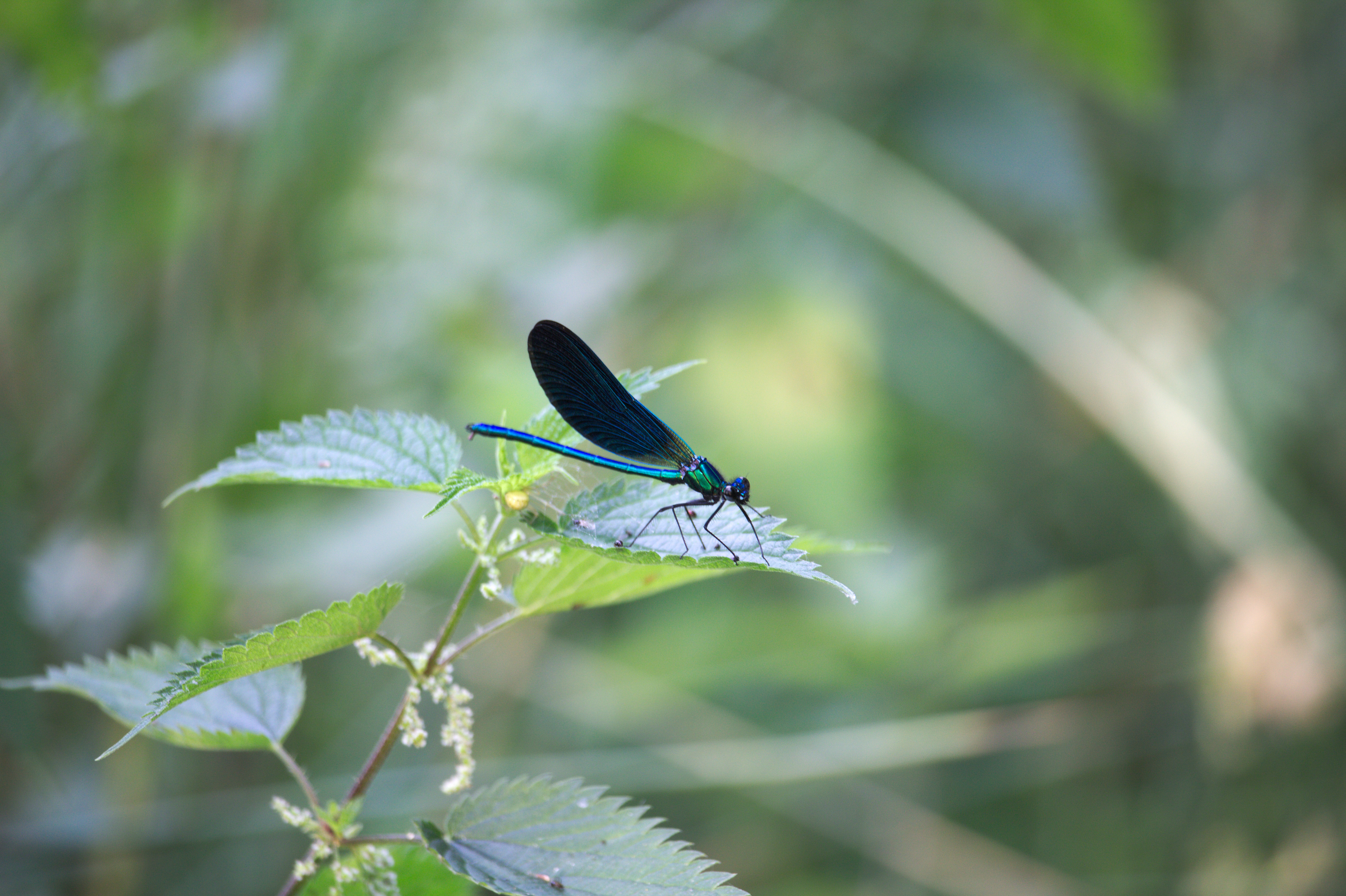 Libellule bleue (zygoptère du genre Calopteryx) sur une feuille d'ortie près d'un cours d'eau